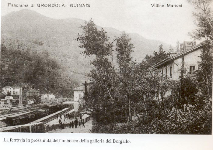 Veduta della stazione ferroviaria di Grandola-Guinadi